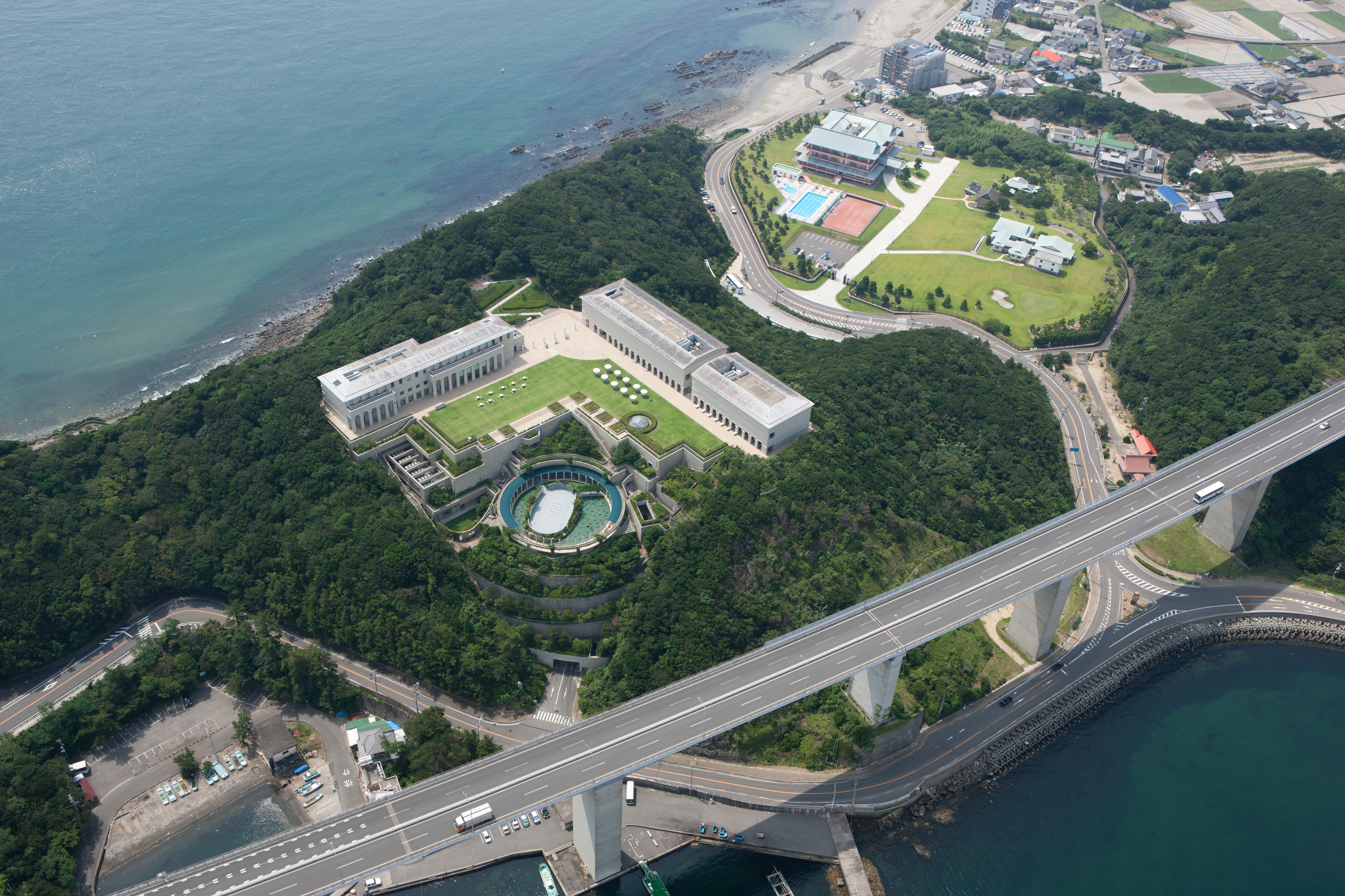 大塚国際美術館の空撮写真